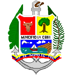 Escudo del municipio La Ceiba, Estado Trujillo, Venezuela